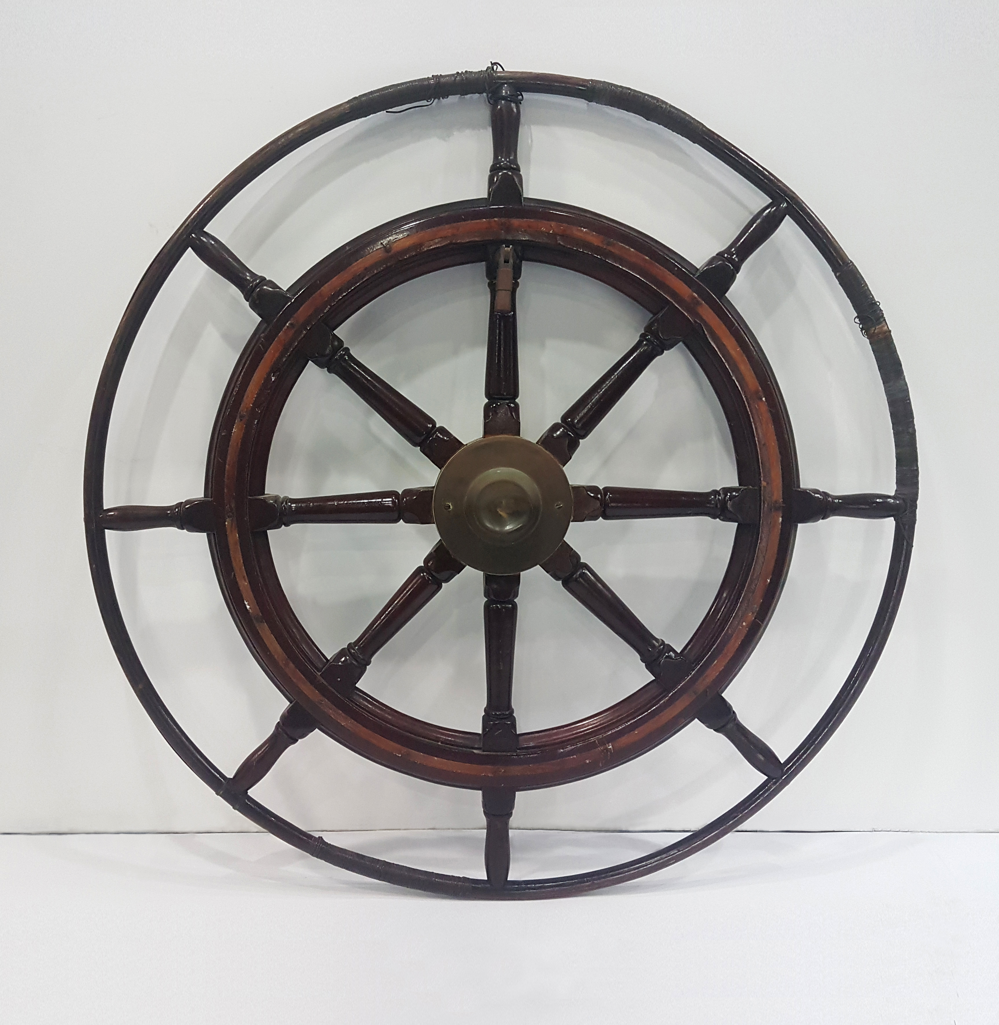 אניית השלום נרכשה בהולנד בשנת 1973. ההגה הוא שנווט את הספינה אל מול חופי תל אביב שם עגנה במים הבינלאומיים, וממנה שידר "ספן השלום", אייבי נתן וצוות שדרניו המתנדבים את "קול השלום"; שהיה קול ייחודי שקרא לפיוס, אחווה ושלום, מלווה במוסיקה צעירה וטובה, לאורך עשרים שנה. בשנת 1966, במבצע נועז, טס אייבי למצרים במטוסו הפרטי ("שלום "1) כדי לעורר הד פנימי ובינלאומי בצורך הדחוף בהידברות ושלום בין עמי האזור. אייבי יזם מפגשים עם פלשתינאים לשיחות קרבה ושלום כאשר מפגשים אלה עוד היו בגדר איסור. על כך שילם מחירים אישיים כולל ישיבה בכלא ישראלי. באחת משעותיו הכלכליות הקשות והמאיישות כאשר המימון להפעלת האנייה וצוותה אזל, נקט אייבי בצעד הפגנתי קיצוני והטביע את אניית השלום במימי הים התיכון; הוא לא שעה לבקשות ידידים להפוך את האנייה למוזיאון, או לתרום אותה למטרות נכונות. אם היא לא ממשיכה לשדר אין לה זכות קיום. דינה נחרץ לטביעה... אייבי אסף ושמר לעצמו ולמען ההיסטוריה מספר פריטים מהאנייה שהייתה לסמל, ביניהם את הגה האנייה. קוטר ההגה כ-135 ס"מ והוא בעל 8 זרועות היוצאות ממרכז עשוי ברזל יצוק אל חישוק פנימי רחב וממנו אל חישוק חיצוני דק יותר העטוף בחלקו בסרט פלסטיק דק (לאבטחת האחיזה כנראה). ההגה עשוי משני סוגי עץ מעובד ומעוצב, ברזל יצוק ונחושת. באדיבות ארכיון השומר הצעיר, יד - יערי שבגבעת חביבה